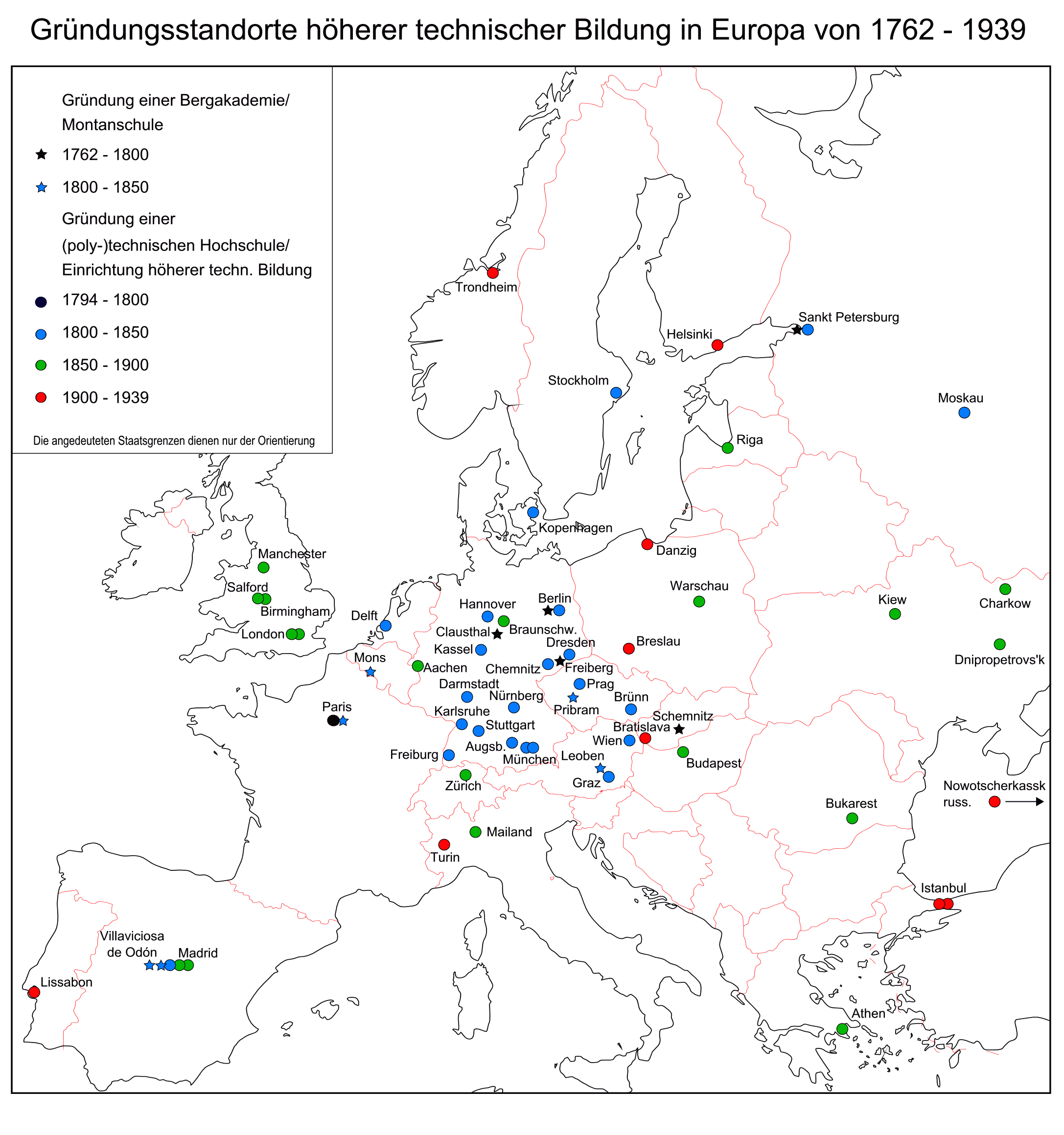 Gruendungen hoeherer technischer Bildung von 1762-1939